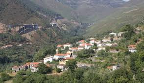 Paisagem